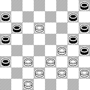 Фрагмент партии Нежметдинов-Коврижкин, 1951